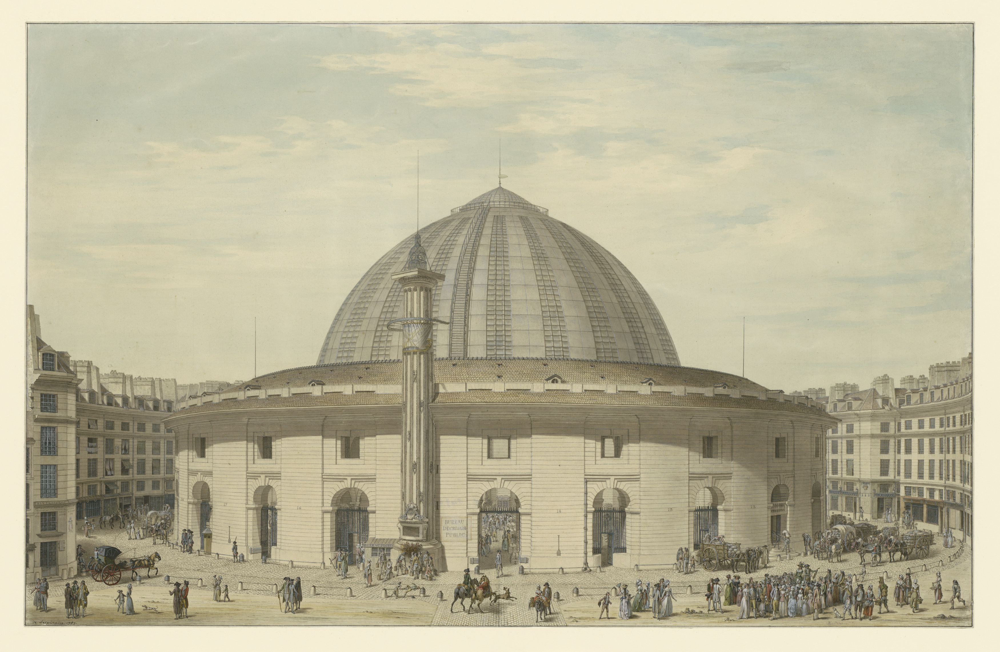 Sujet : La halle aux blés, Paris (actuelle Bourse de commerce de Paris)